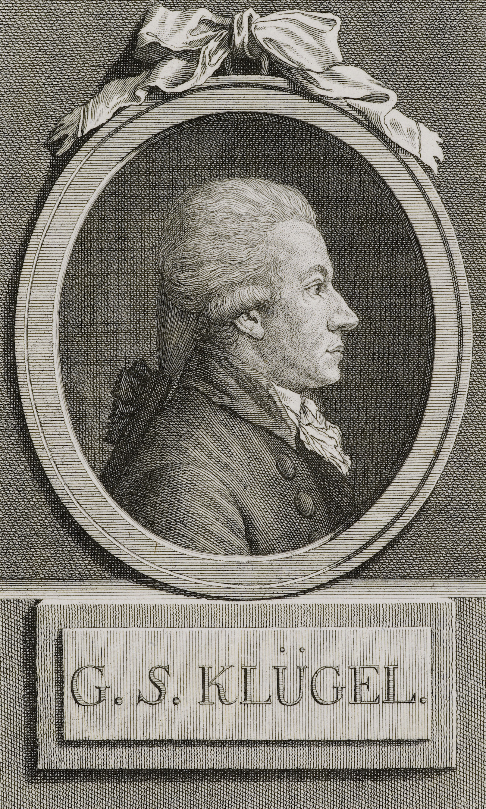 G. S. Klügel